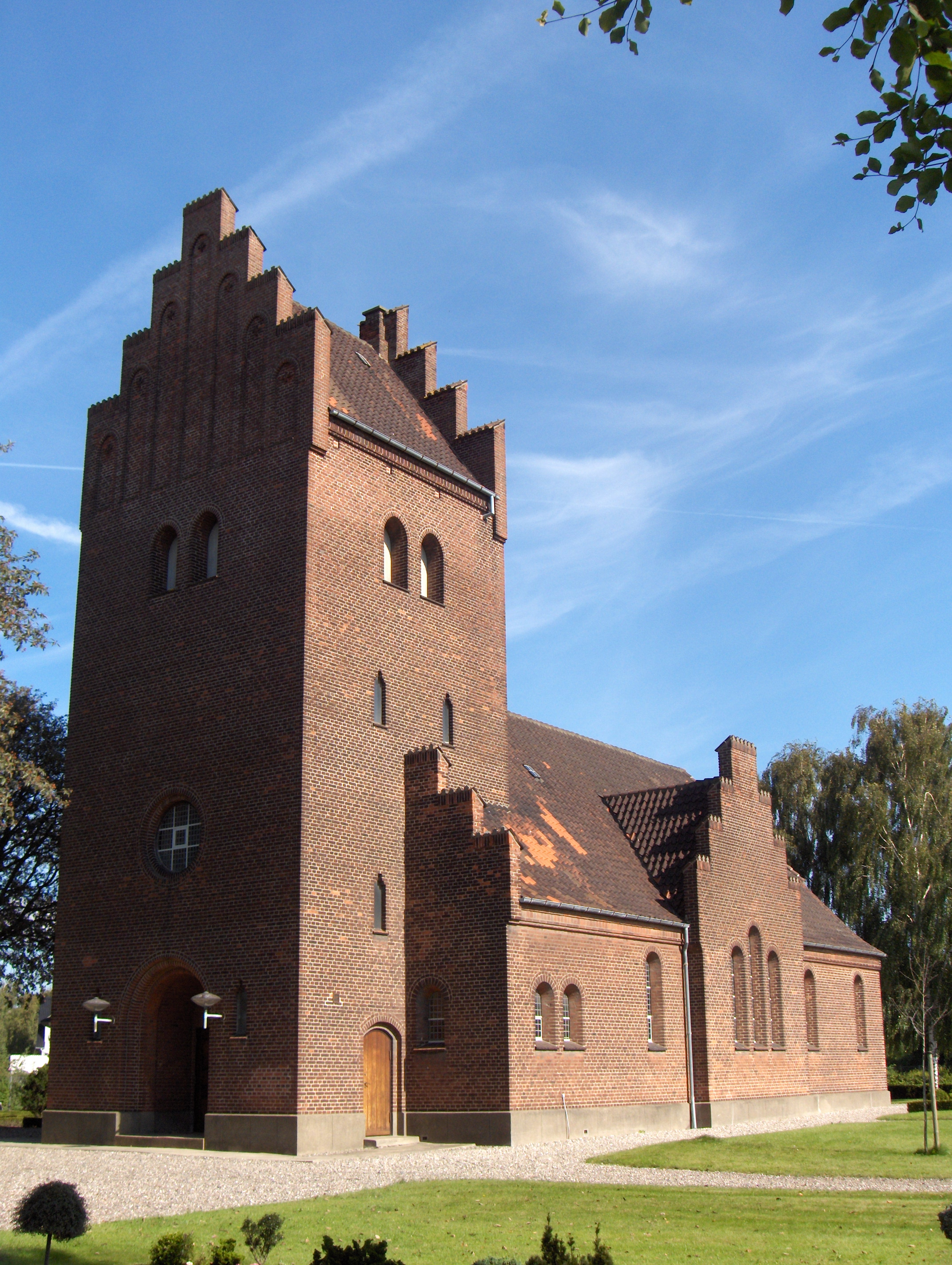 Rørdal Kirke ved Aalborg